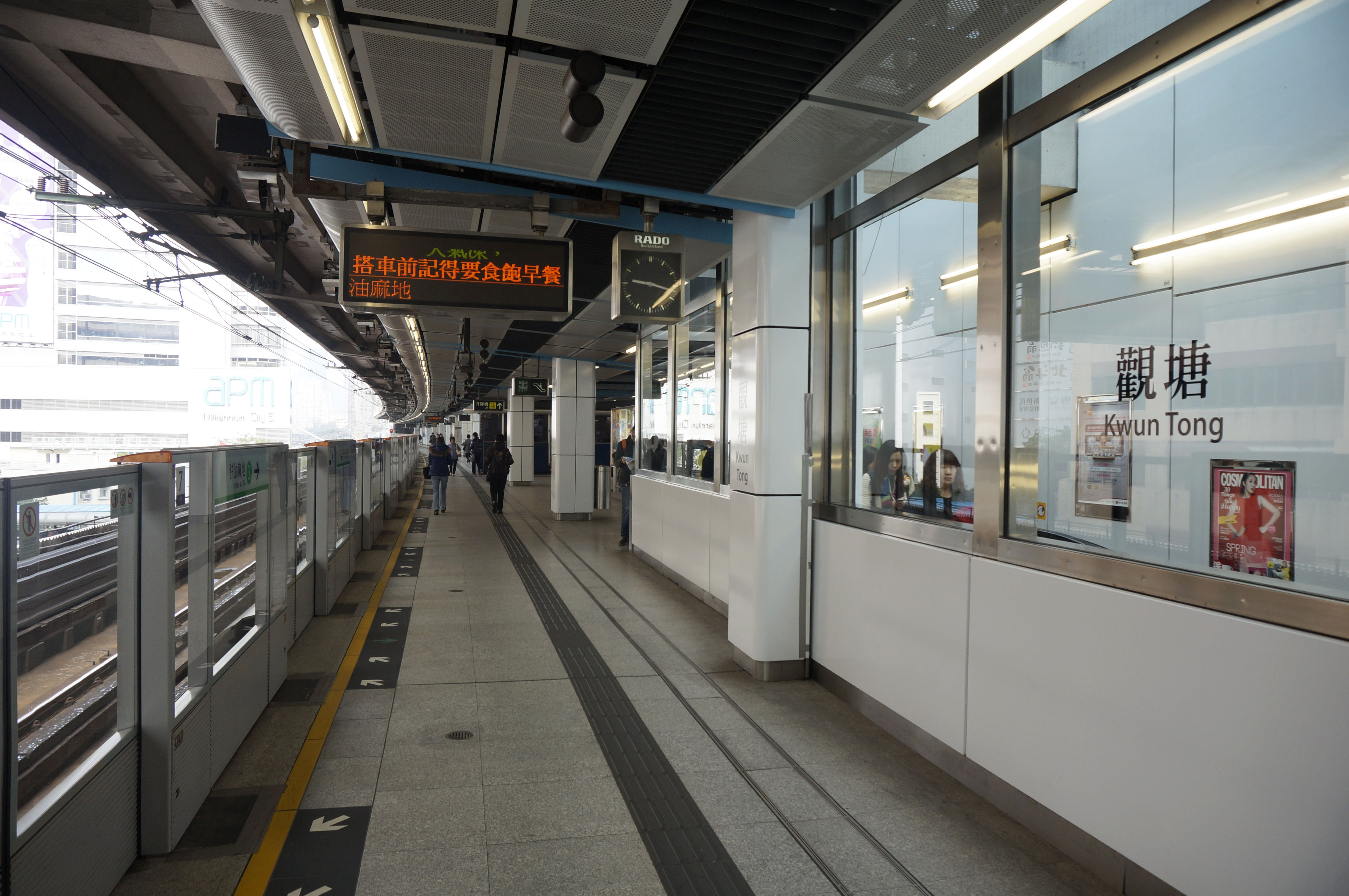 港鐵觀塘站月台